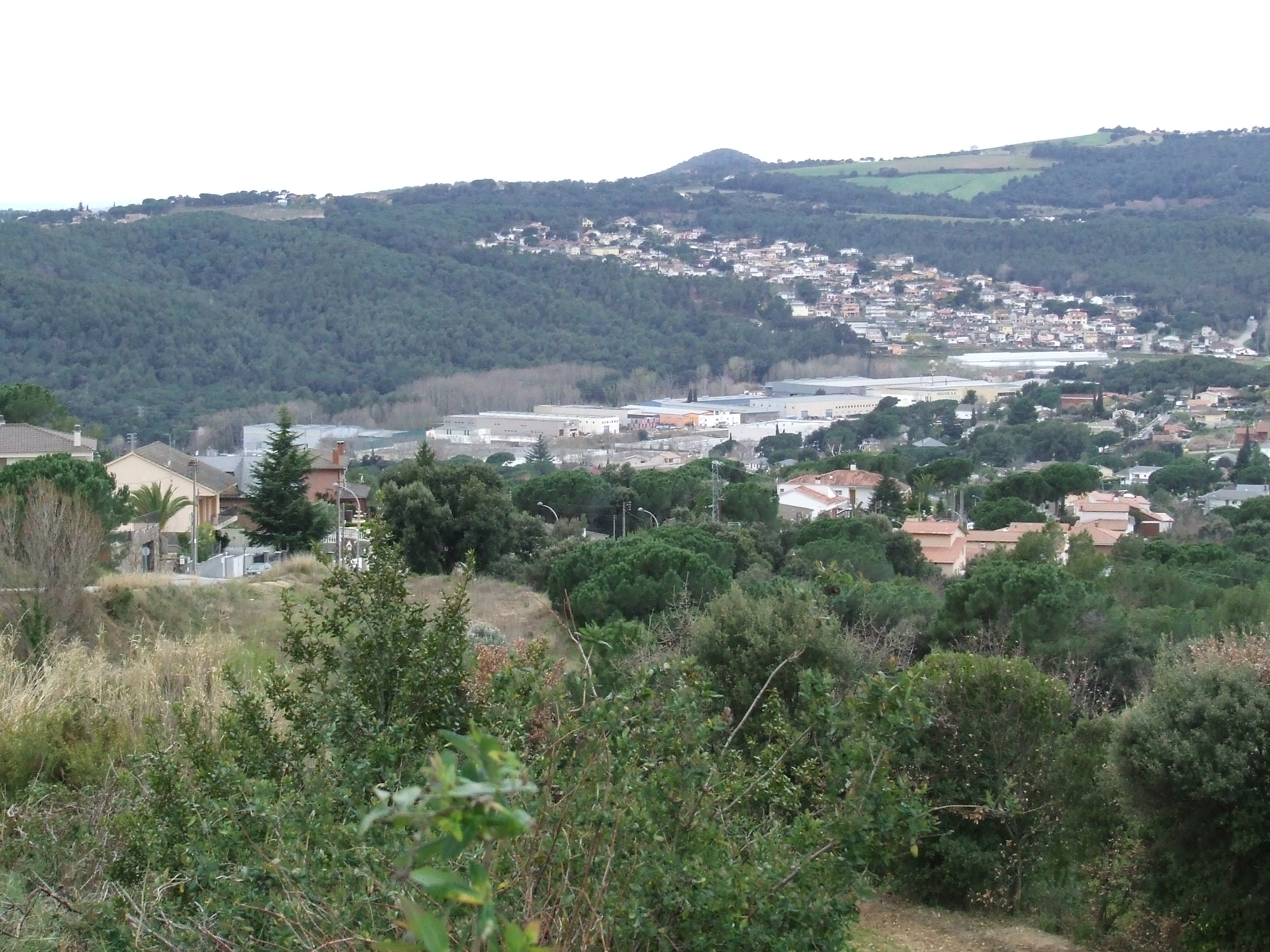 El Polígon Industrial de Can Barri (Bigues, Bigues i Riells, Vallès Oriental)